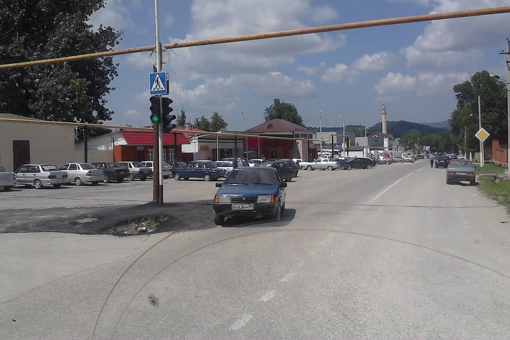 Vedeno, Chechnya, Russia